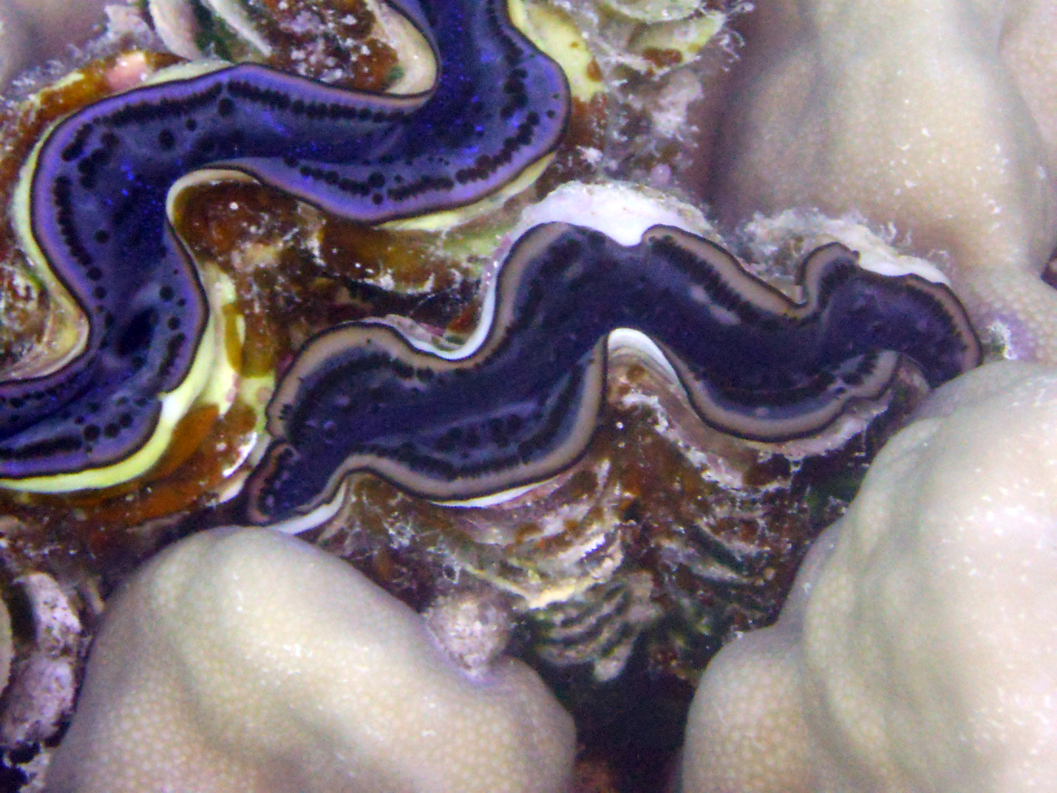 Tridacna squamosa Mar Rosso